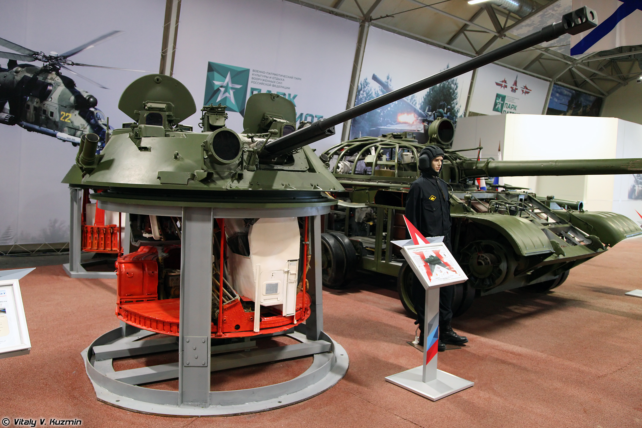 Стенд аппарата заряжания БМП-2 (BMP-2 loader training simulator)